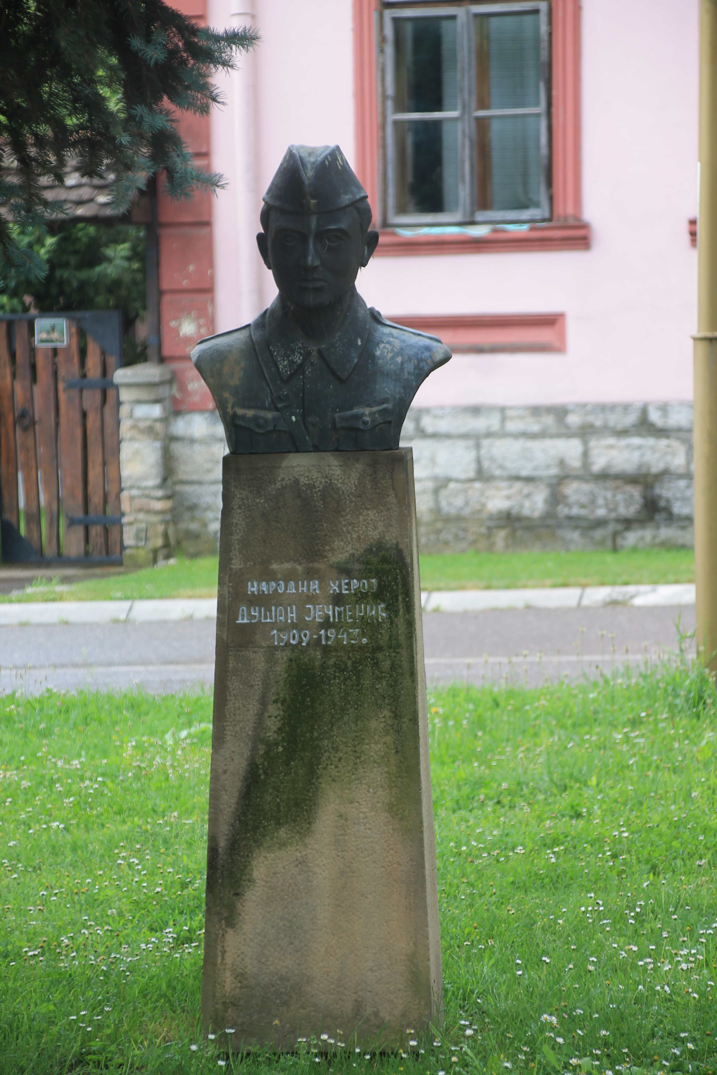 Guča (Srbija)